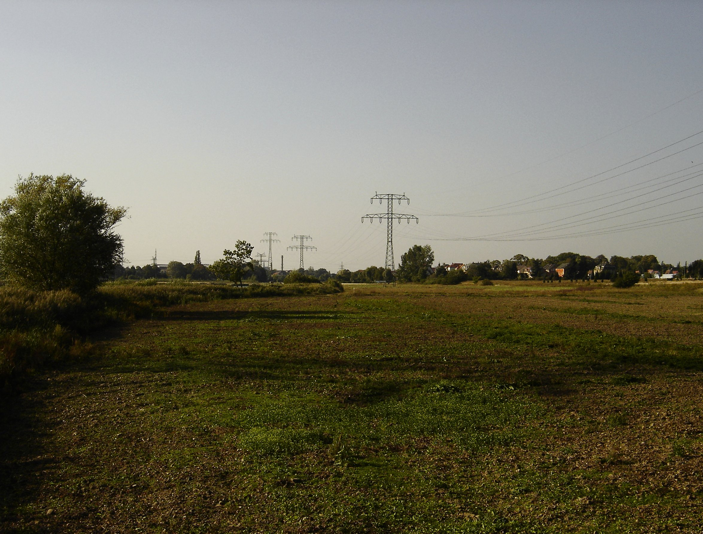 cut-off meander near Zschieren, Dresden